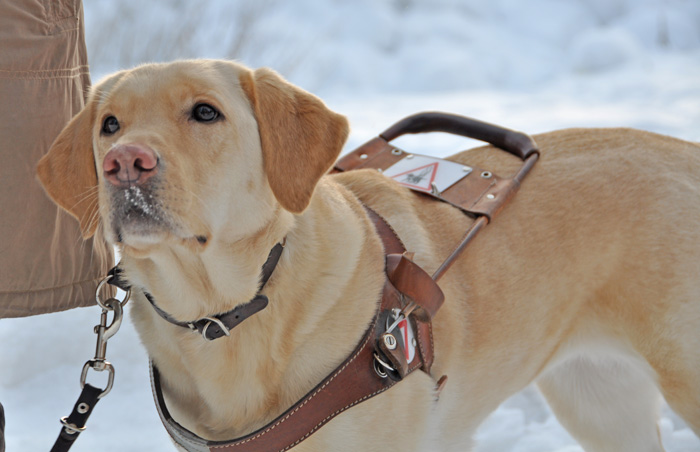 Description